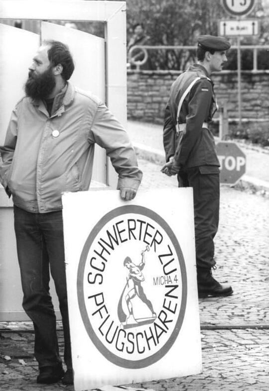 ADN-Hirschberger-29.10.1990-Erfurt: Gegen militärische Gelöbnisse, für Abrüstung und Entspannung trat während der Rekrutenvereidigung in der Erfurter Steiger-Kaserne eine Gruppe der "Grünen" ein.